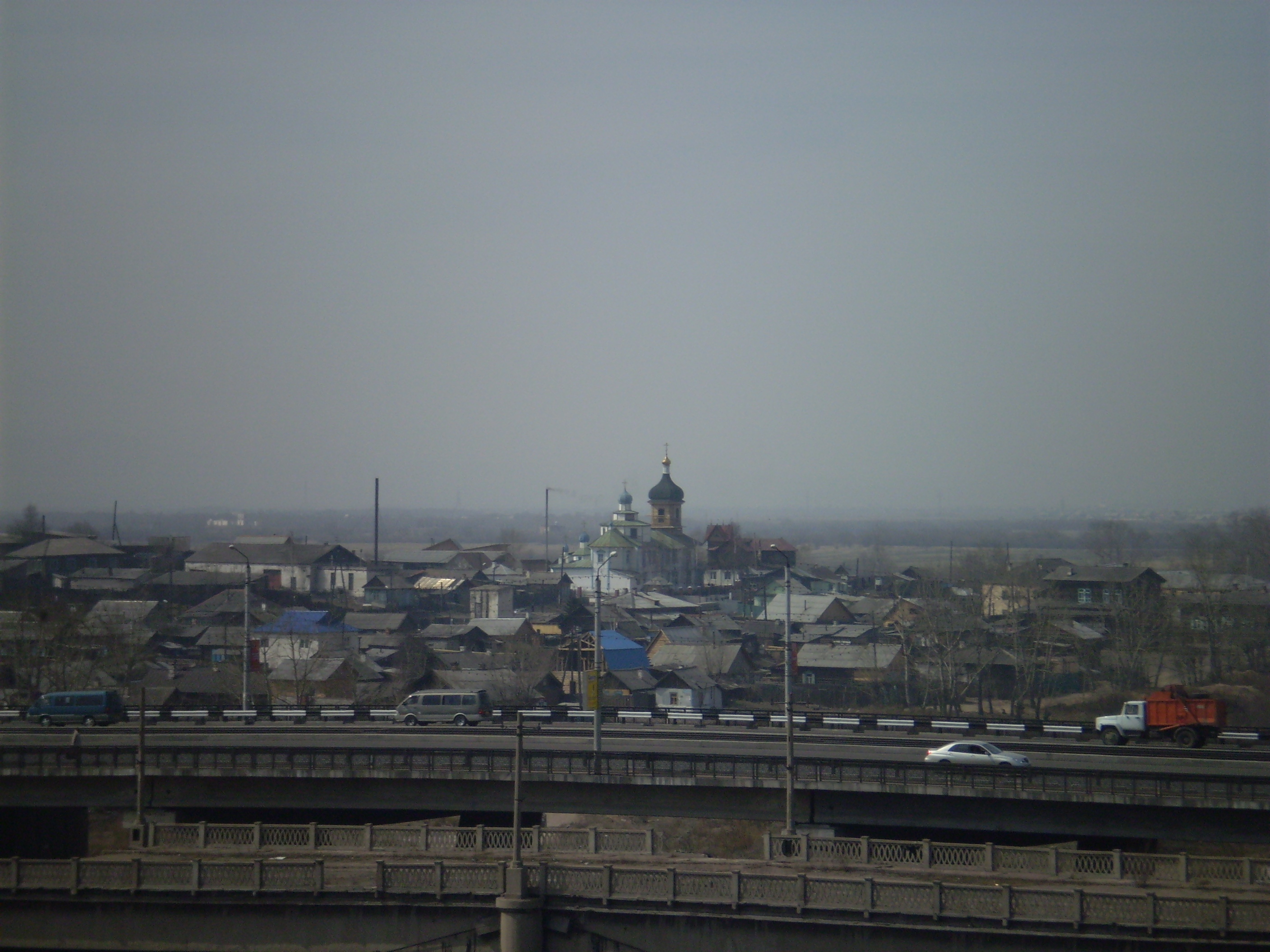 Церковь за Удой